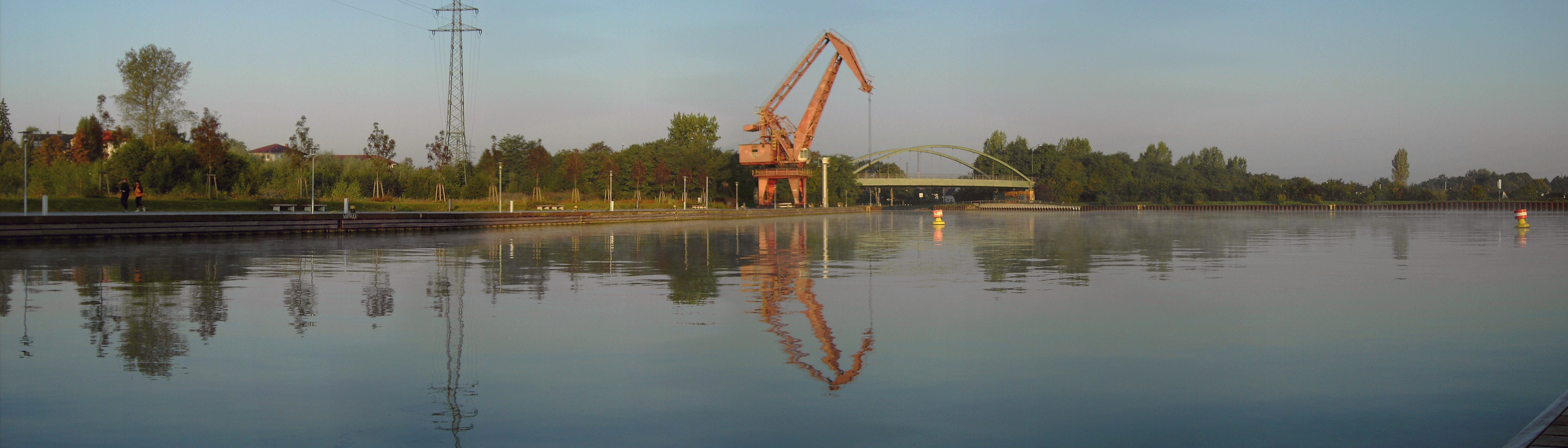 Preussenhafen, Mohrkran, Lünen, Ruhrgebiet, Germany, Panorama made of 4 single photos at sunrise